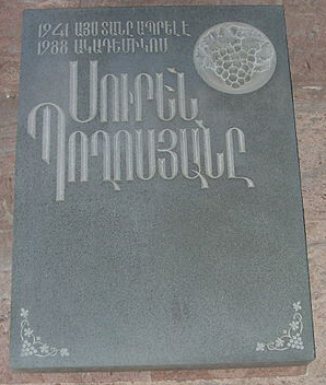 Мемориальная доска С. Погосяна. Проспект Месропа Маштоца, 9.